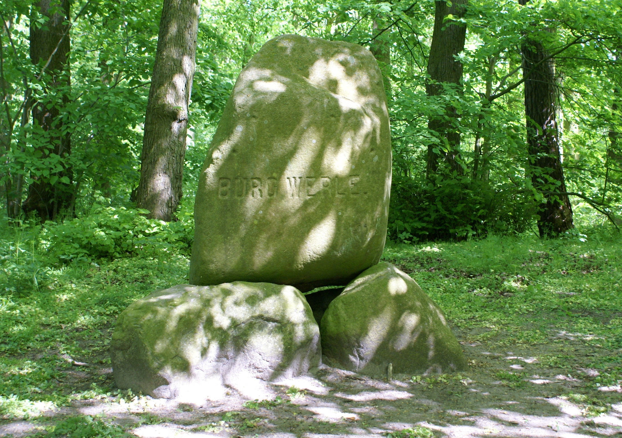 Granitfindling Burg Werle